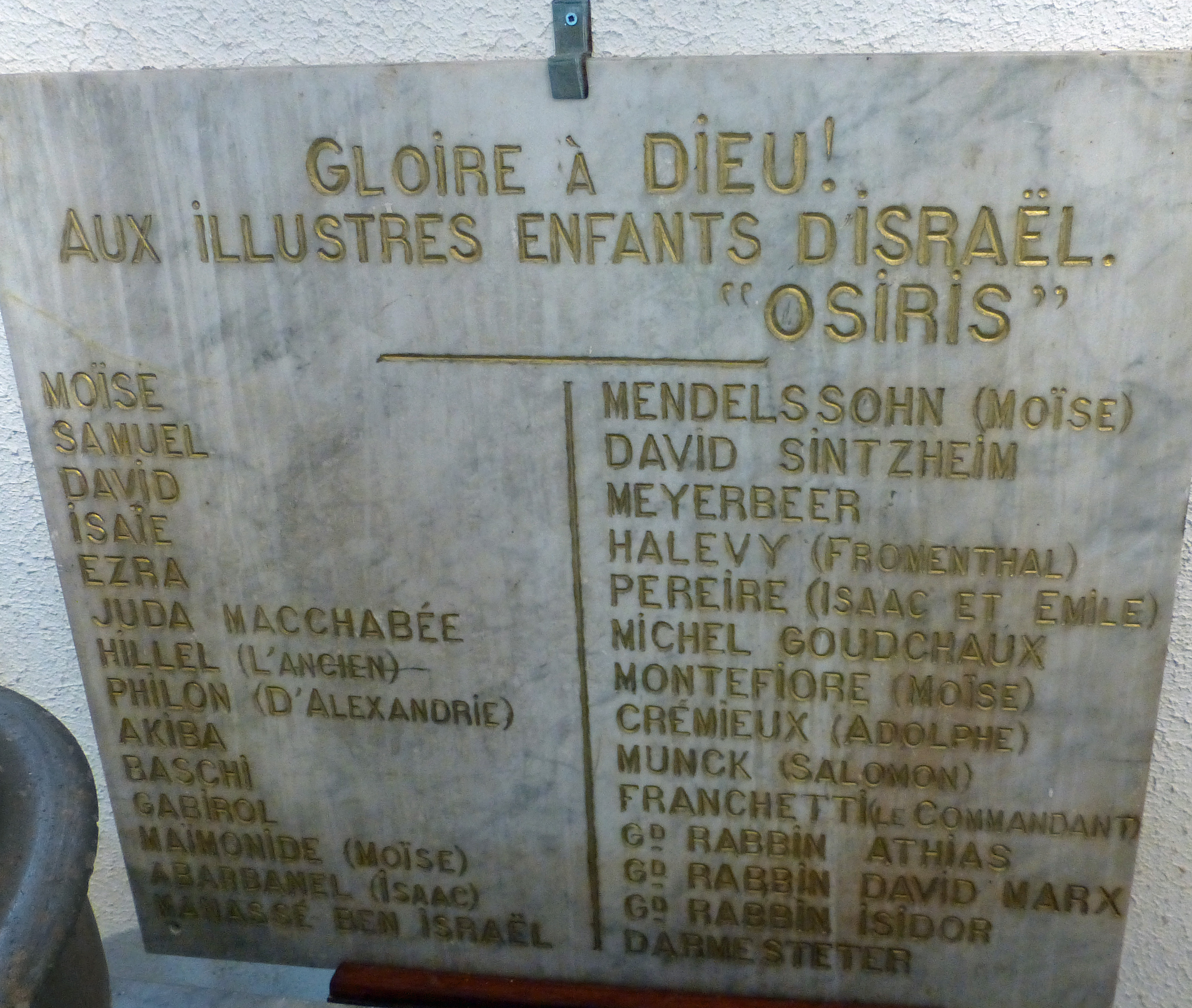 Plaque de marbre dédiée "aux illustres enfants d'Israël", apposée sur le mur de l'ancienne synagogue de Bruyères par le mécène Daniel Osiris pour honorer les juifs célèbres (personnalités religieuses ou profanes). Musée Henri-Mathieu (Bruyères, Vosges)